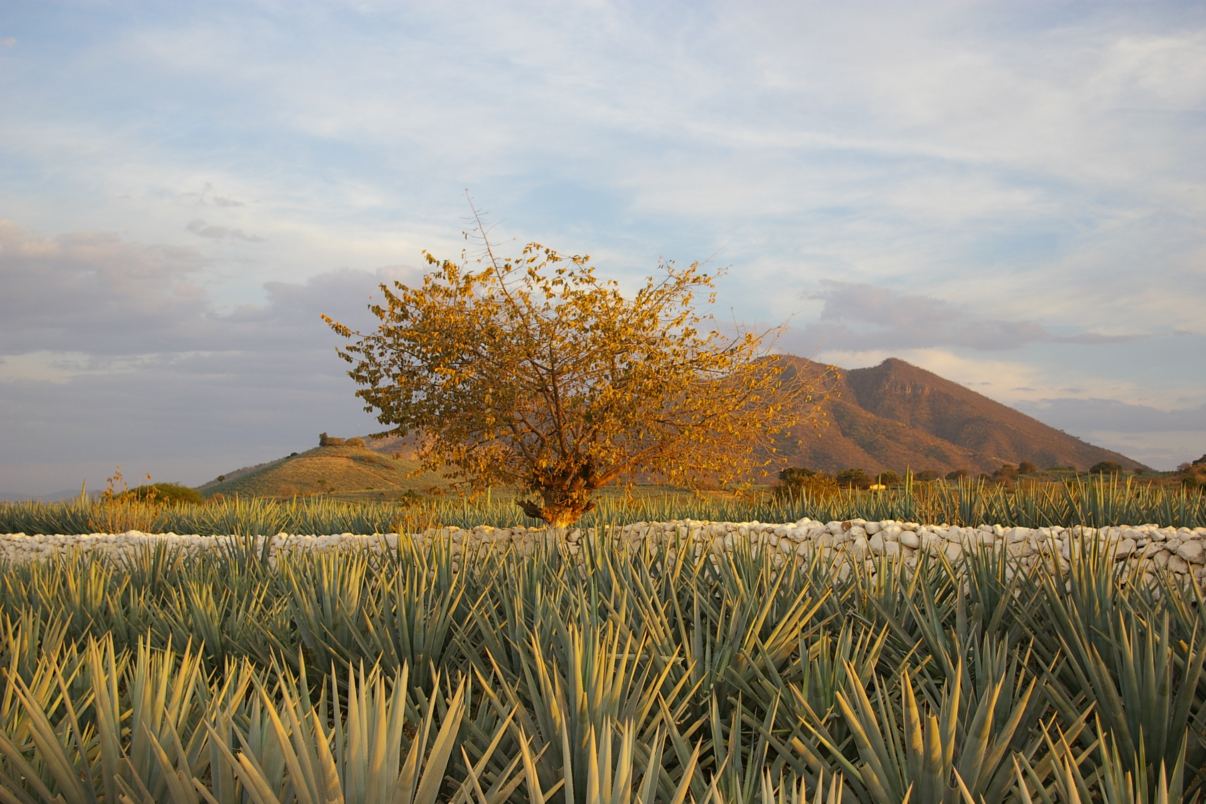 Tequila, Jalisco.